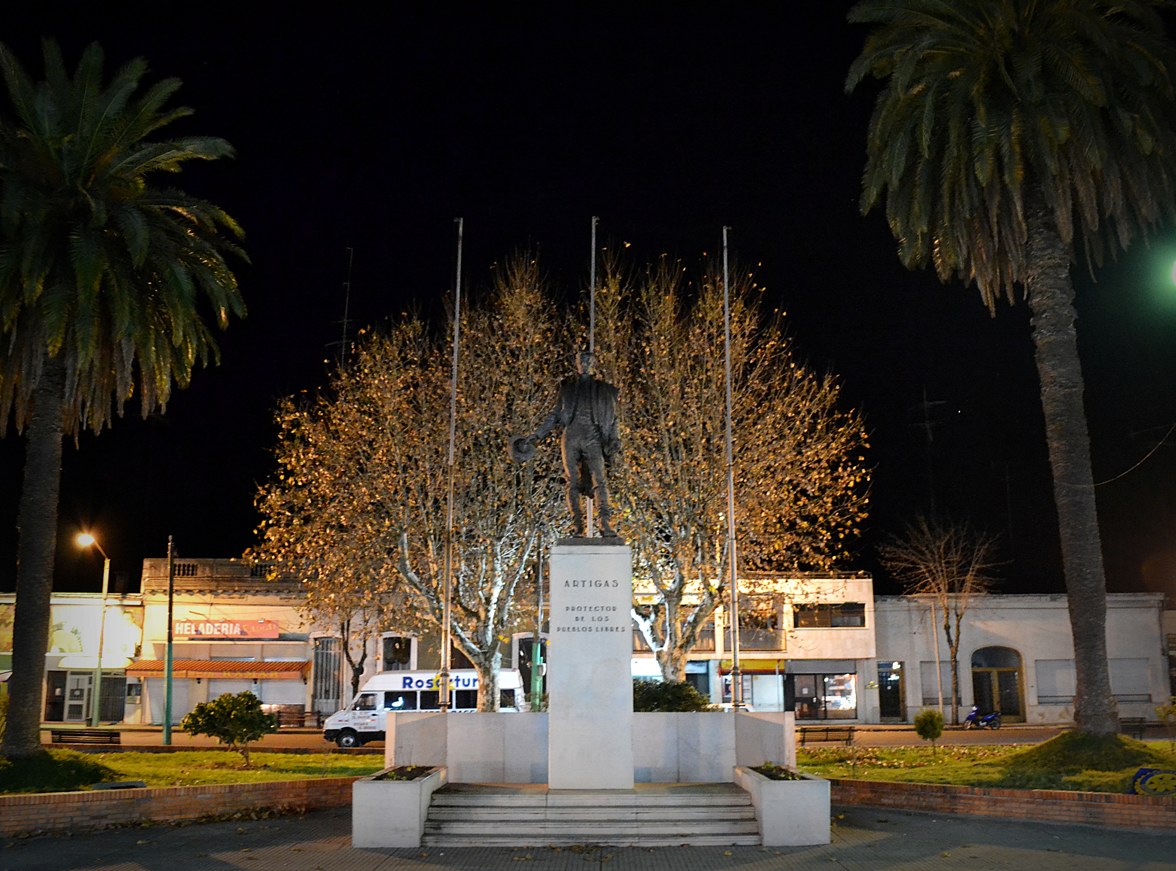 Monumento a Artigas (Rosario). Ubicada en el departamento de Colonia